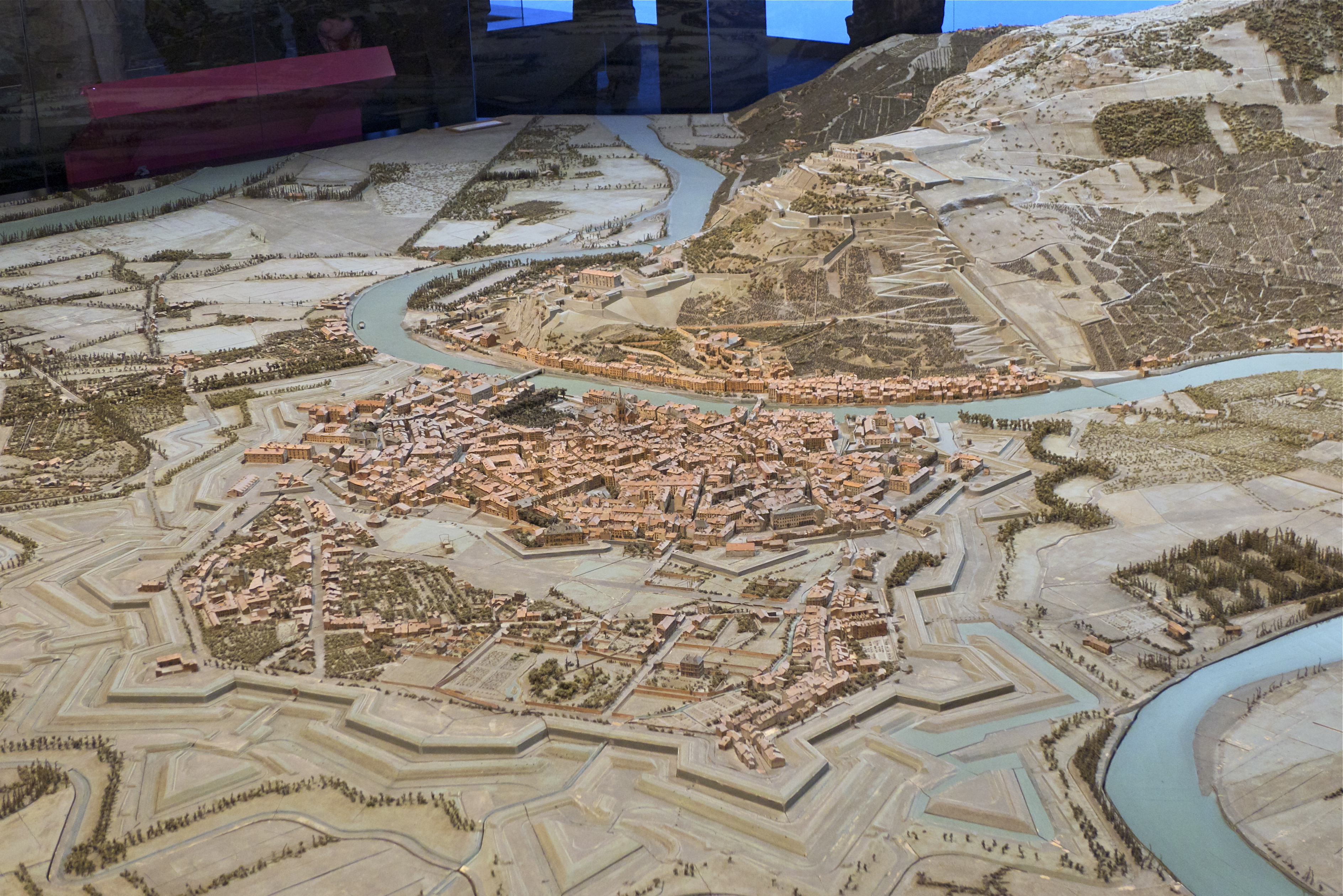 Plan-relief de Grenoble en 1848. Plan-relief construit de 1843 à 1848. Échelle 1/600e